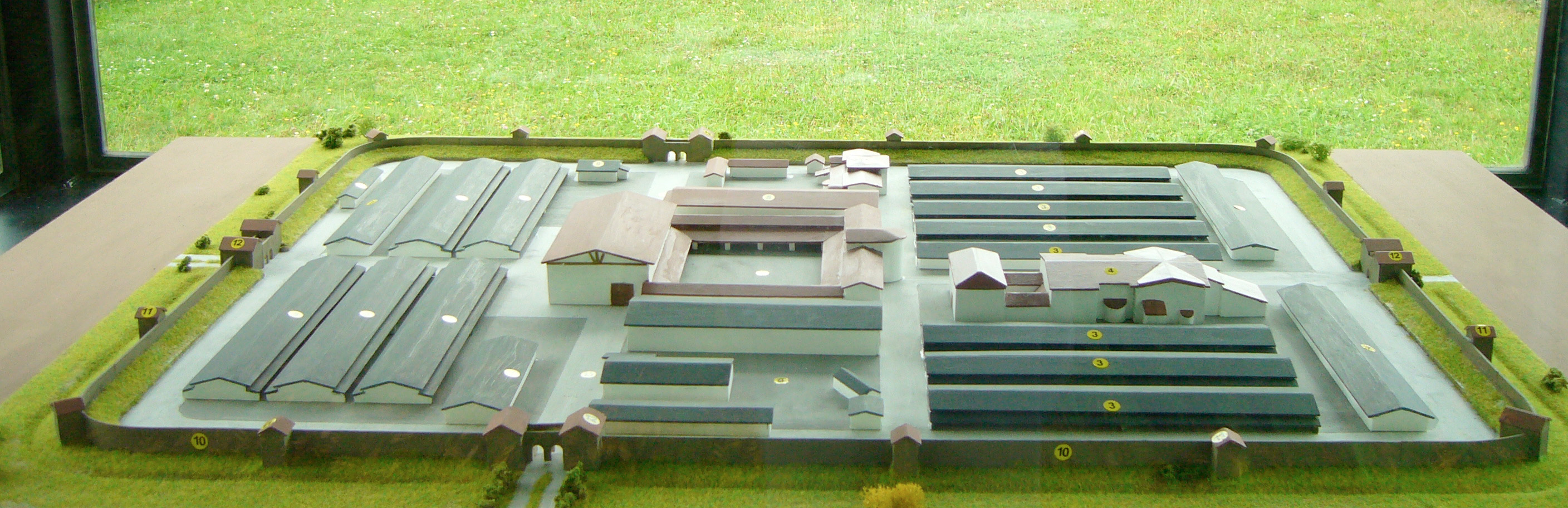 Kastell Niederbieber, Modell, 2007